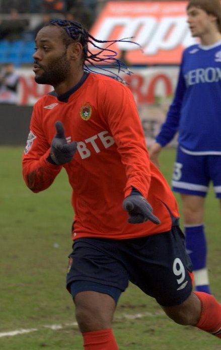 Vágner Love